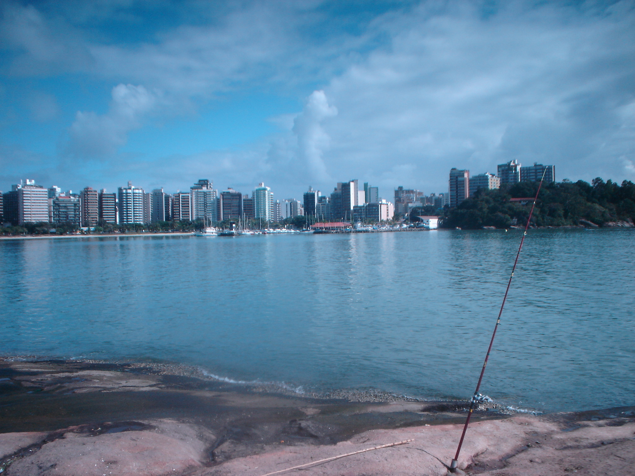 Praia em Vitória/ES, Brasil